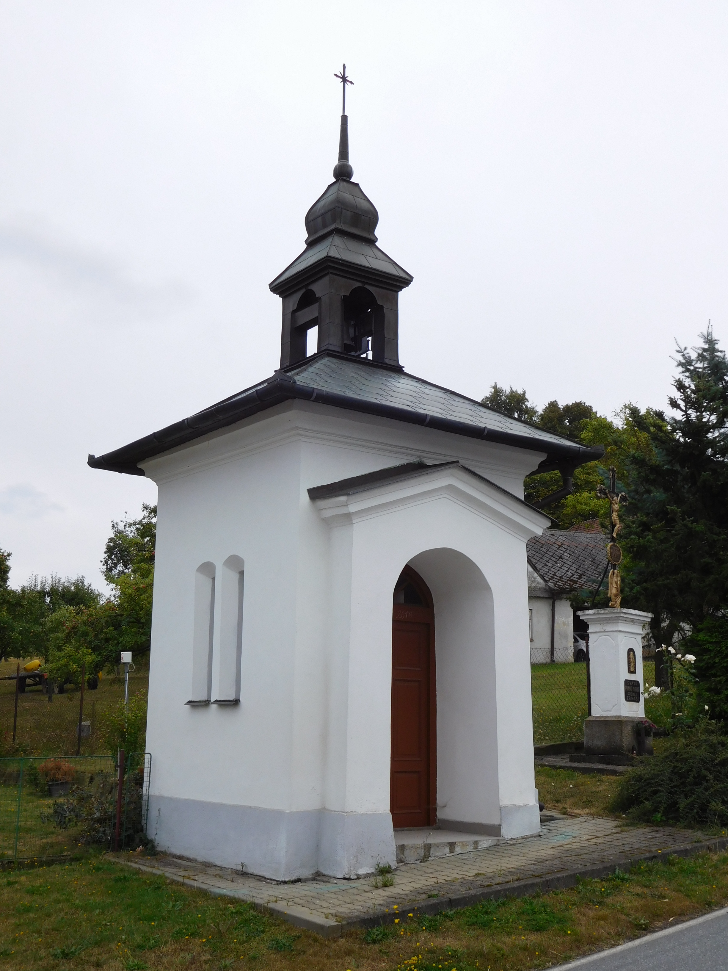 Míchov - kaplička P. Marie a krucifix